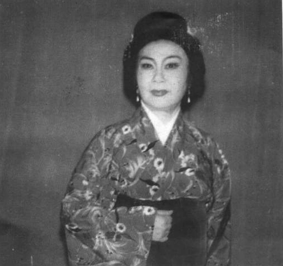 錫劇演員梅蘭珍劇照：於《鑑湖女俠》中飾演秋瑾。